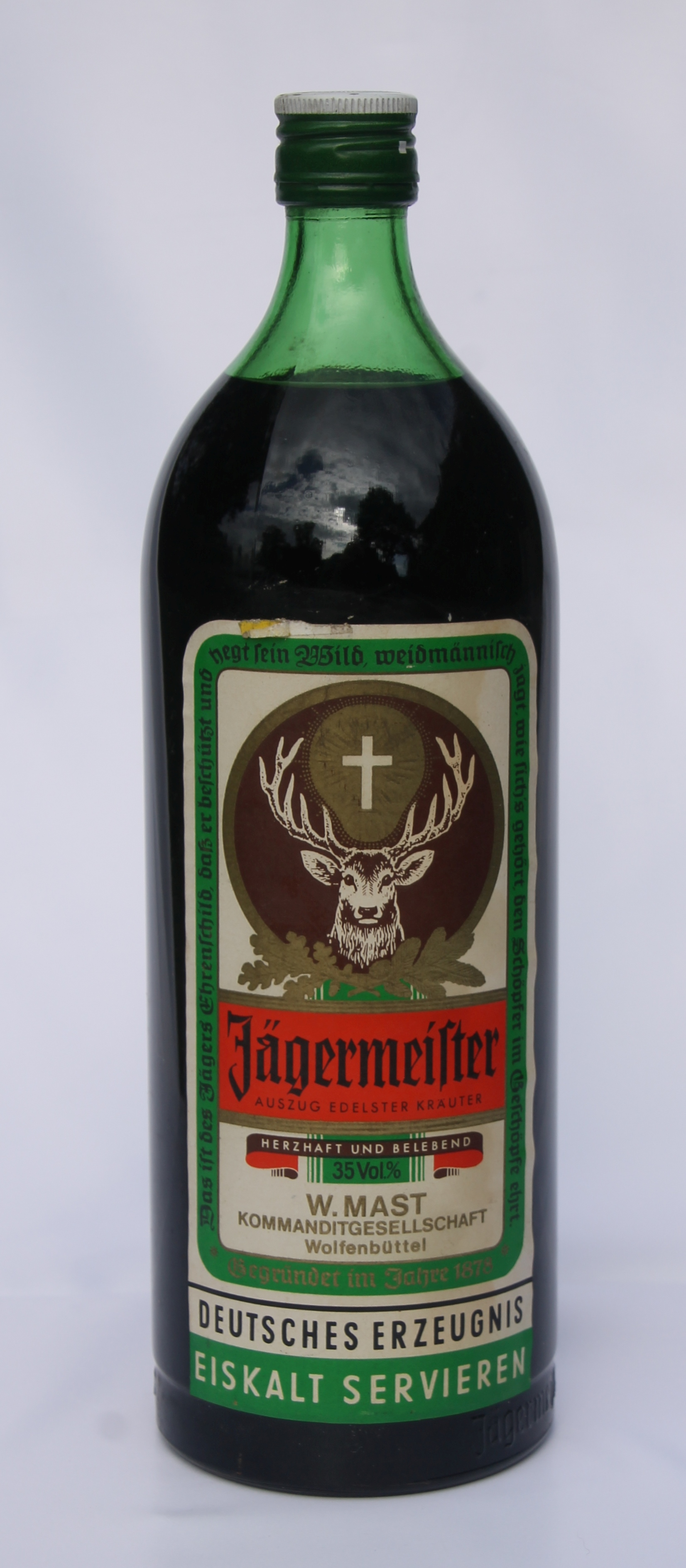 Jägermeister, runde Flasche; Nach Angabe von Jägermeister: "Die runde Literflasche Jägermeister wurde in Deutschland seitens unseres Hauses zwischen 1954/55 und 1996 angeboten. Ihre Flasche stammt aus dem Zeitraum zwischen 1970 und 1981. Eine genauere Altersbestimmung ist bei Flaschen aus diesem Entstehungszeitraum leider nicht möglich.